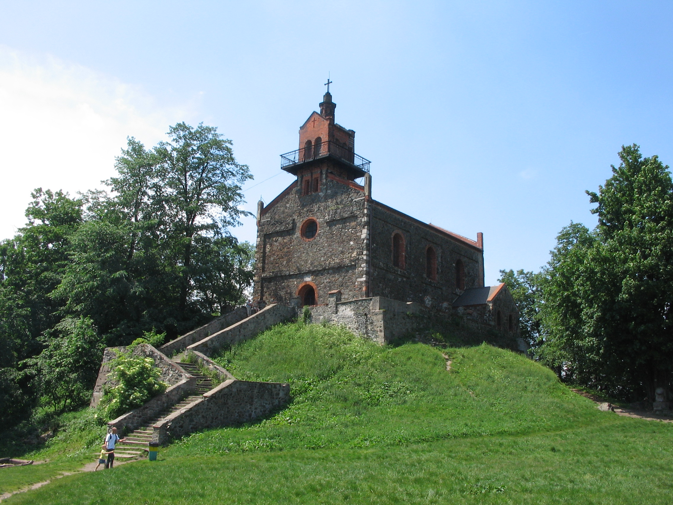 Kościół pw. Najświętszej Marii Panny na Ślęży